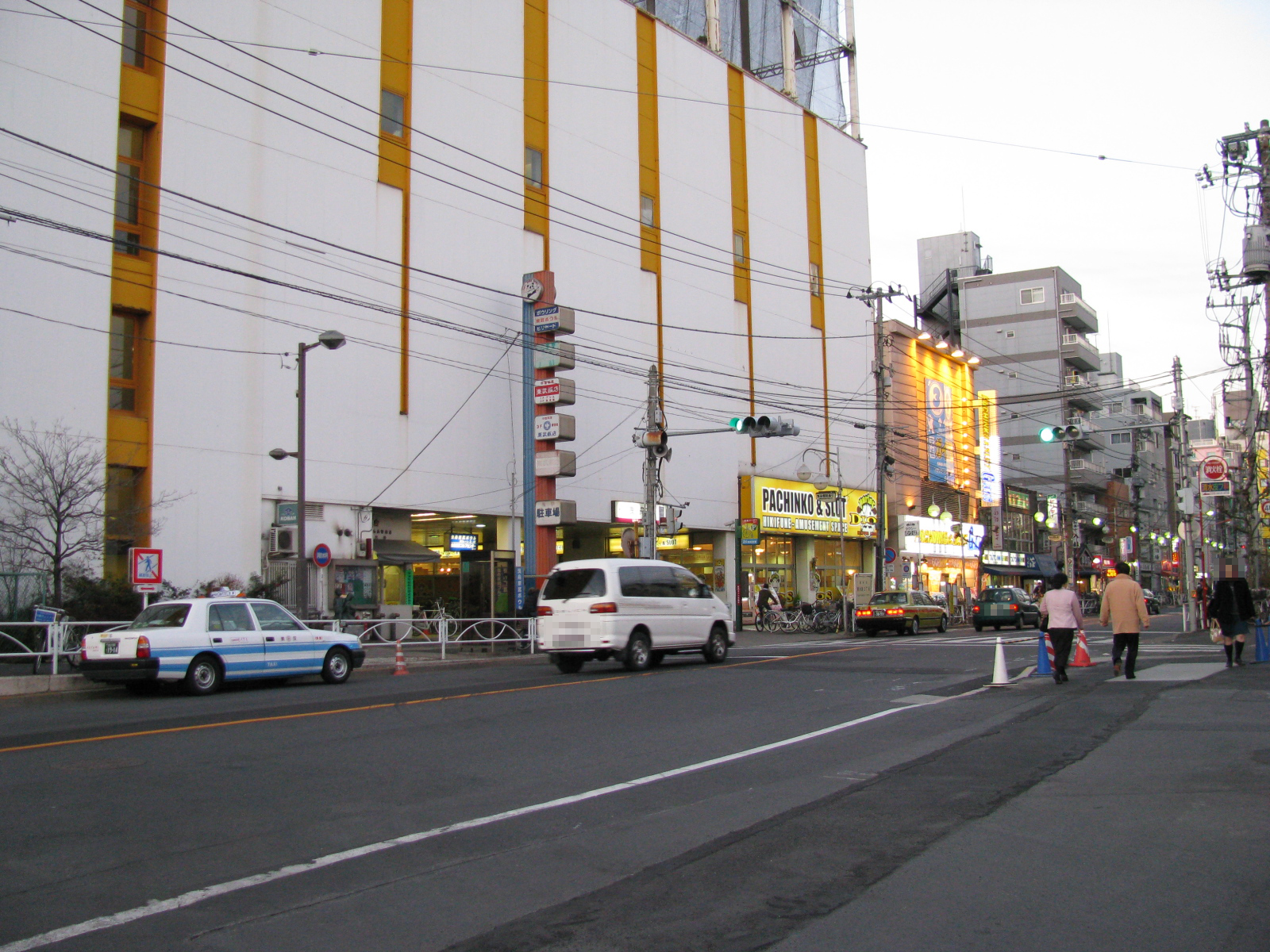 東武鉄道曳舟駅前